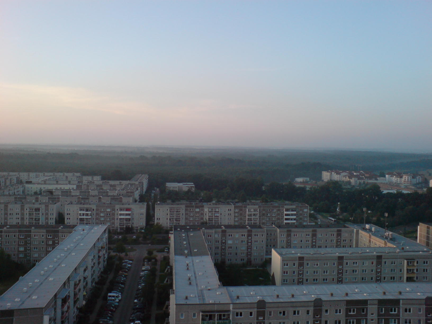 Blick auf die Dächer des Potsdamer Wohngebietes Drewitz